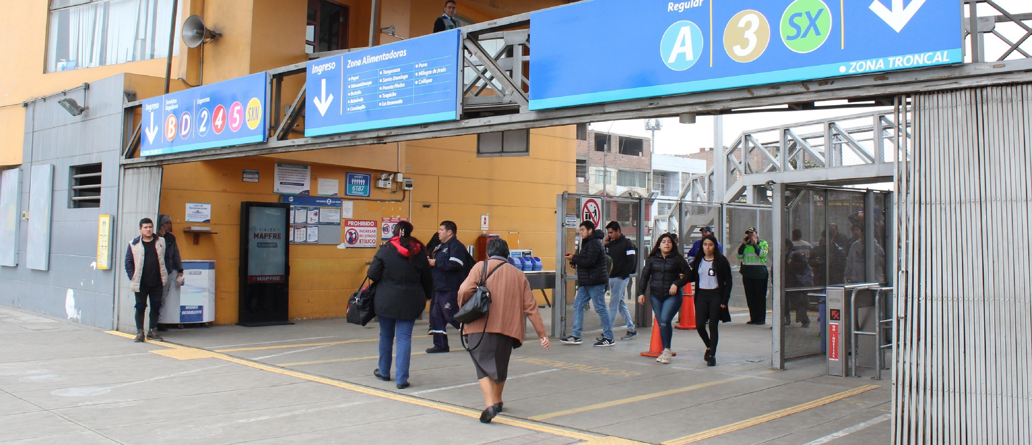 Plataforma de enbarque de la estacion Naranjal del Metropolitano de Lima.